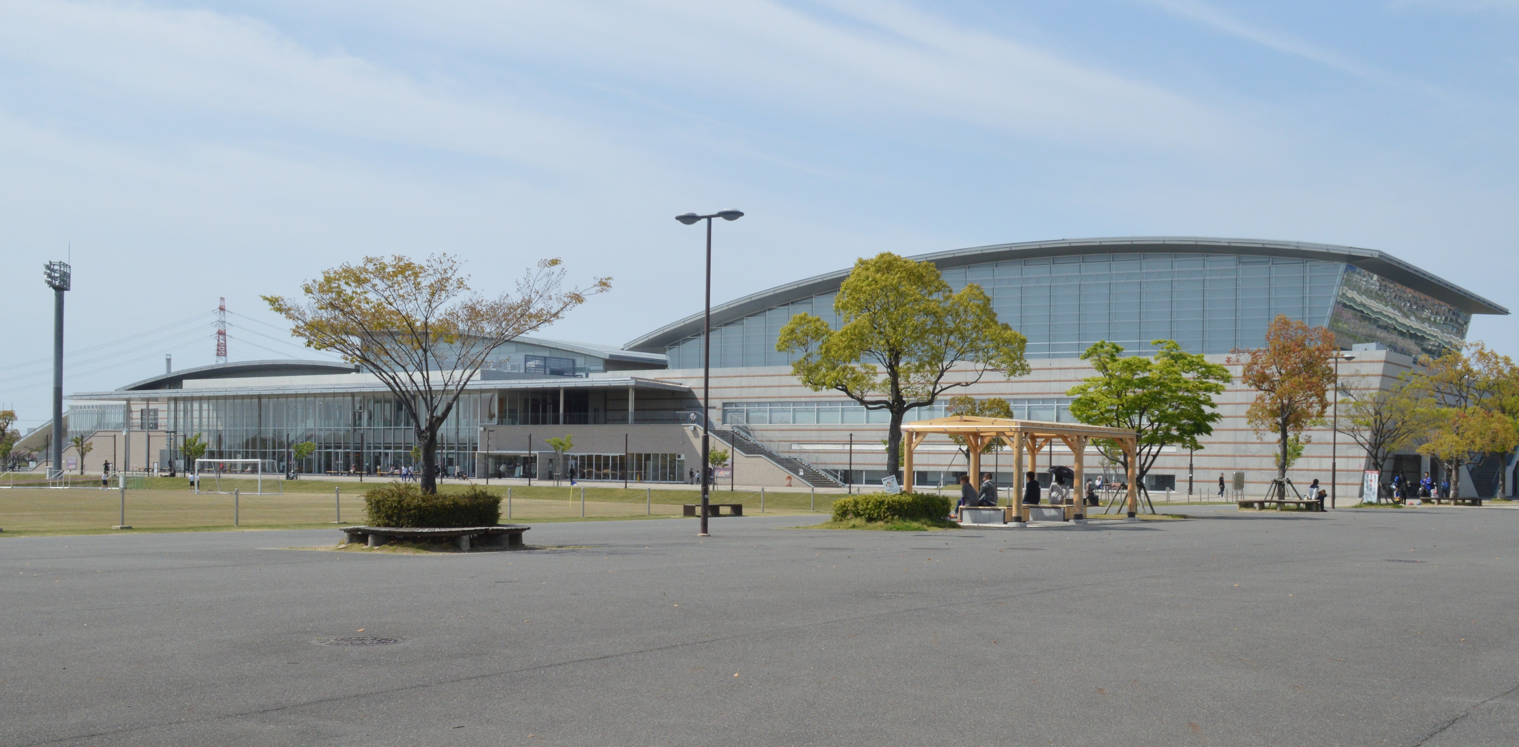 刈谷市総合運動公園のウイングアリーナ刈谷